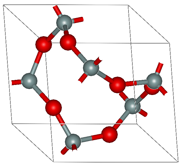 a-quartz, red atoms are oxygens